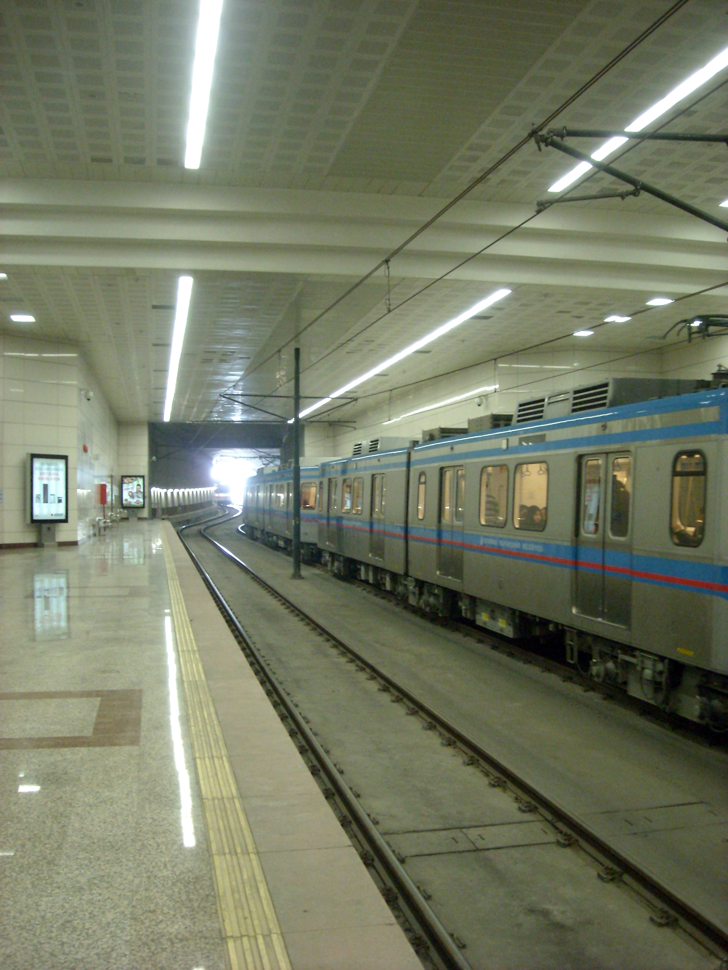 Edirnekapı tram stop